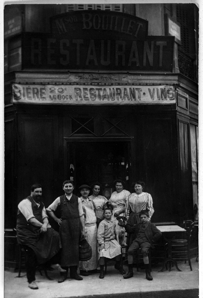 Maison Bouillet, restaurant parisien en 1910-1913, proposant bière, vins, et restaurant. Au coin de la rue Malher et de la rue du Roi-de-Sicile, dans le 4e arr. de Paris